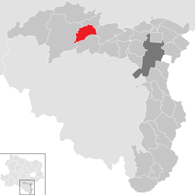 Bezirk Wiener Neustadt-Land